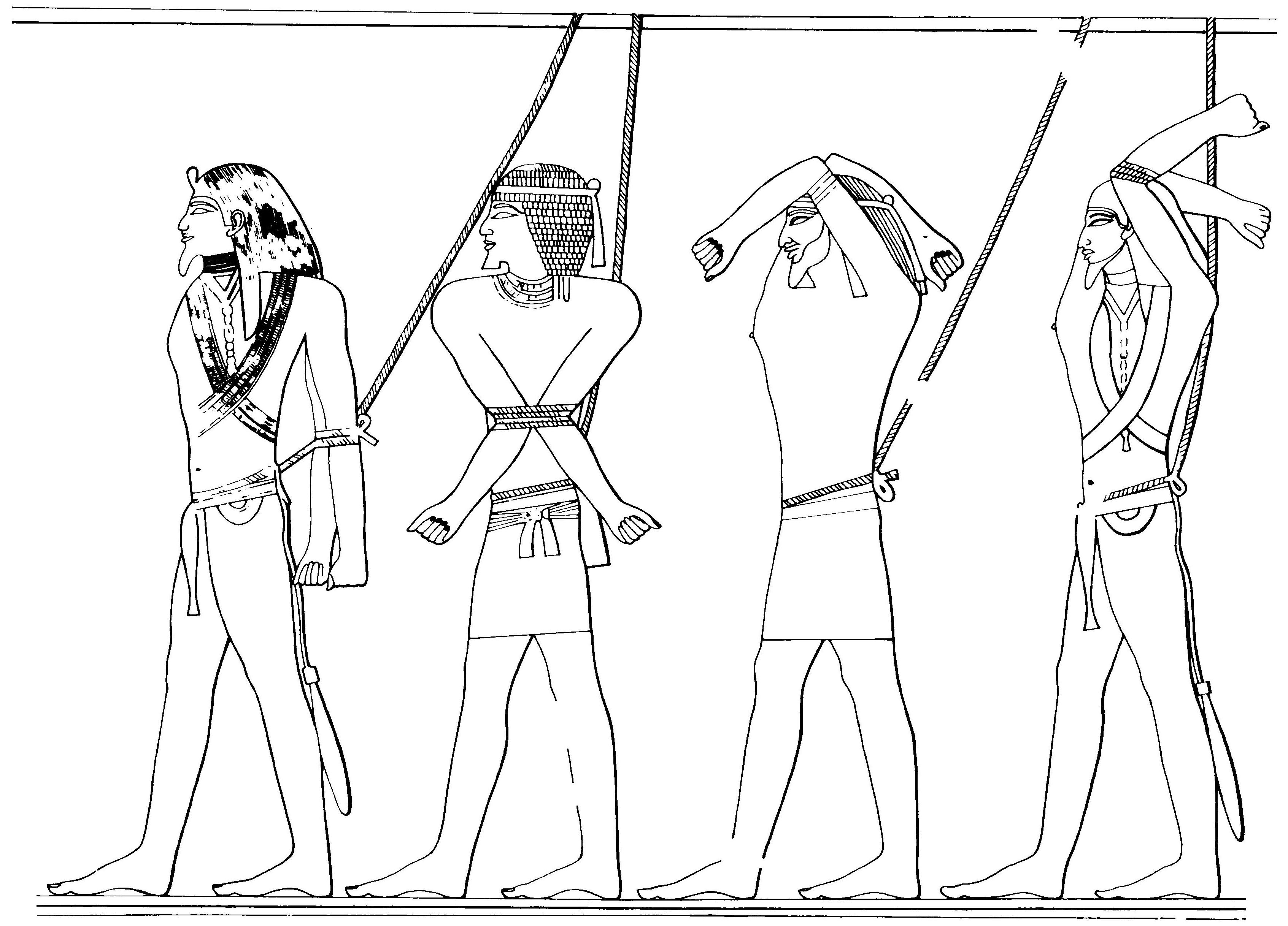 Zajatí nepřátelé; reliéf z Sahureova zádušního chrámu